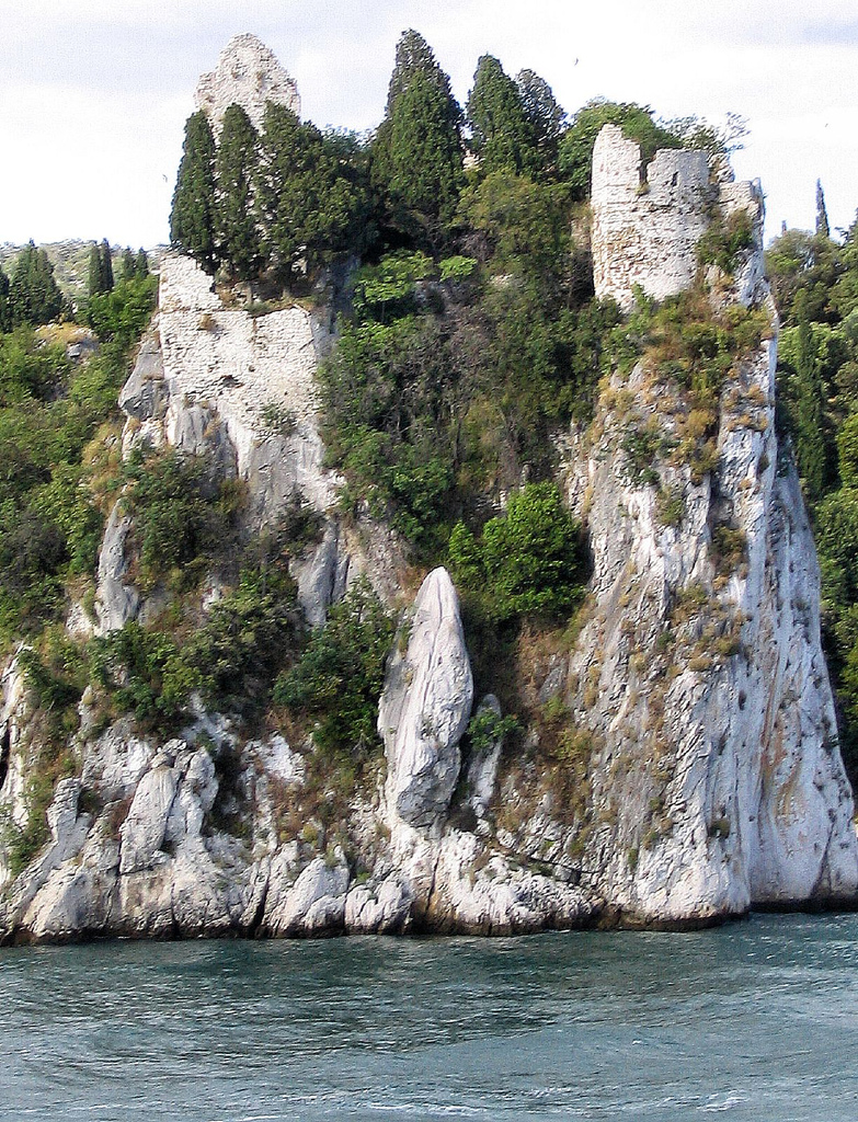 Duino, Friuli Venezia Giulia, Italia